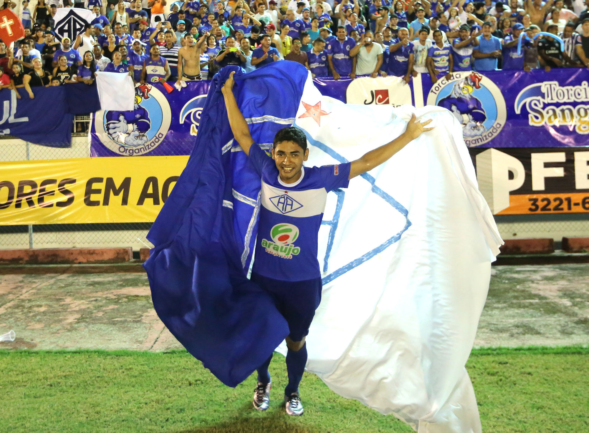 Foto: Sérgio Vale/Secom